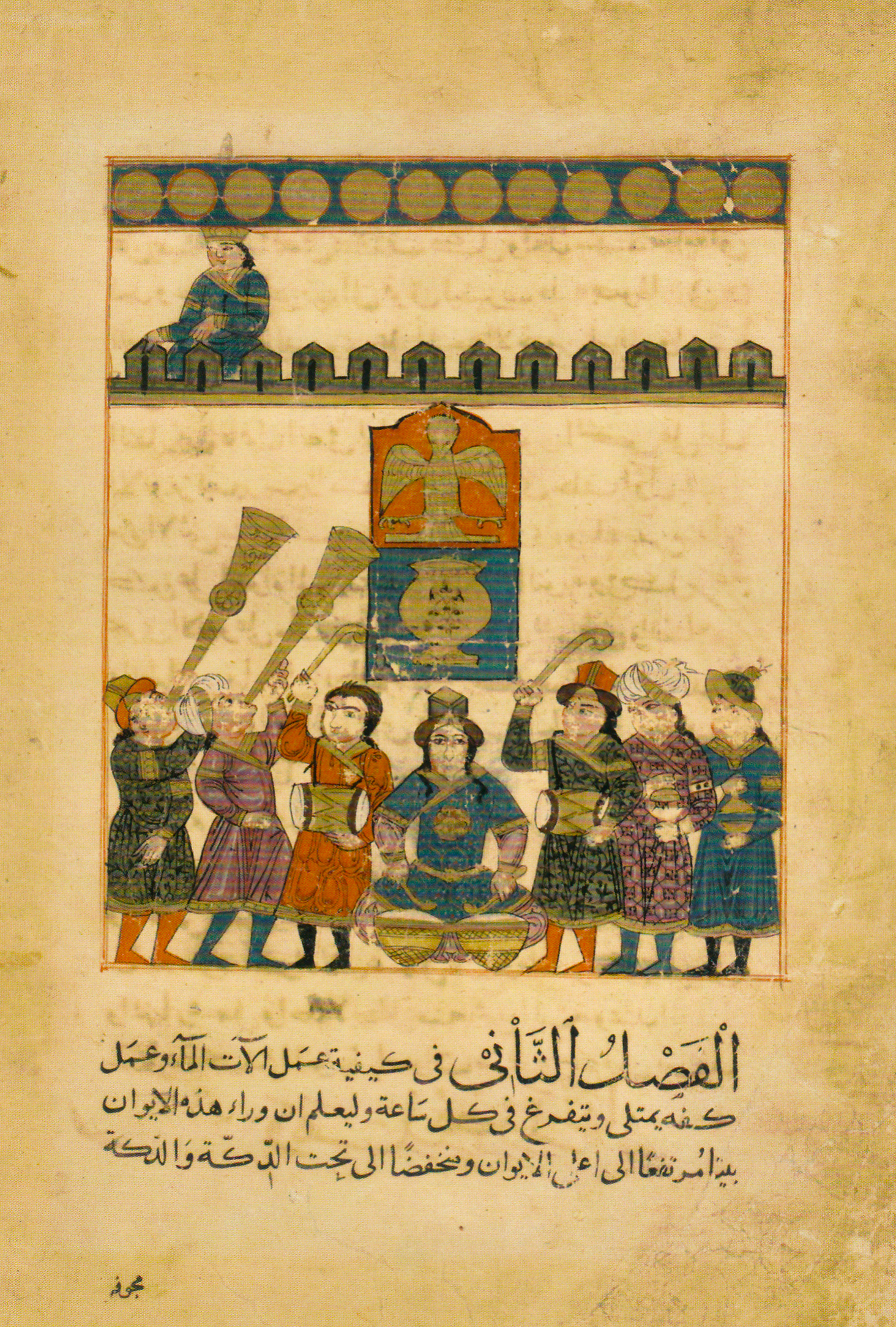 L'horloge des tambours est la deuxième horloge hydraulique ; elle est plus simple que l'horloge du château.